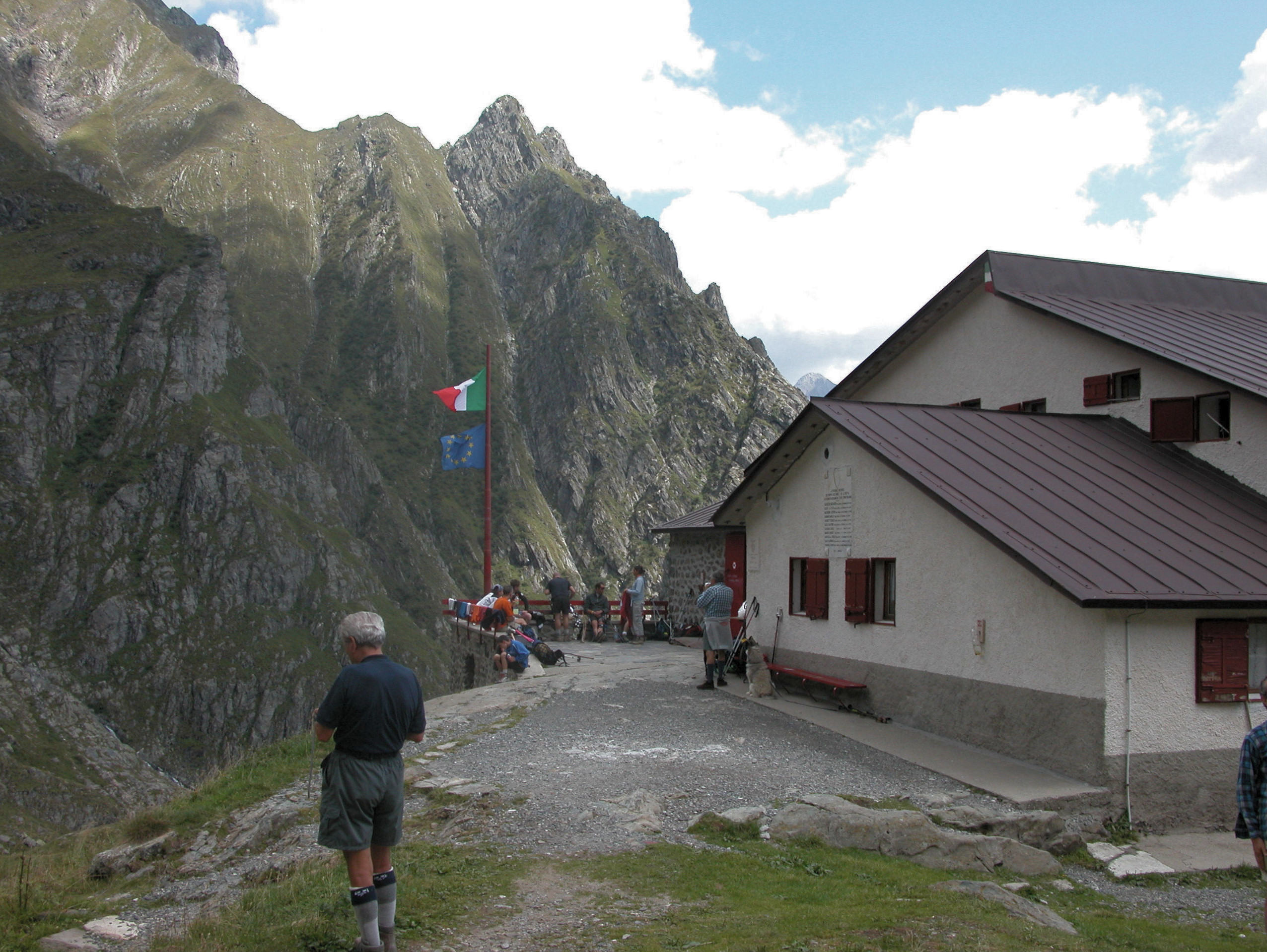 Rifugio Coca (m 1892), sul Sentiero delle Orobie.